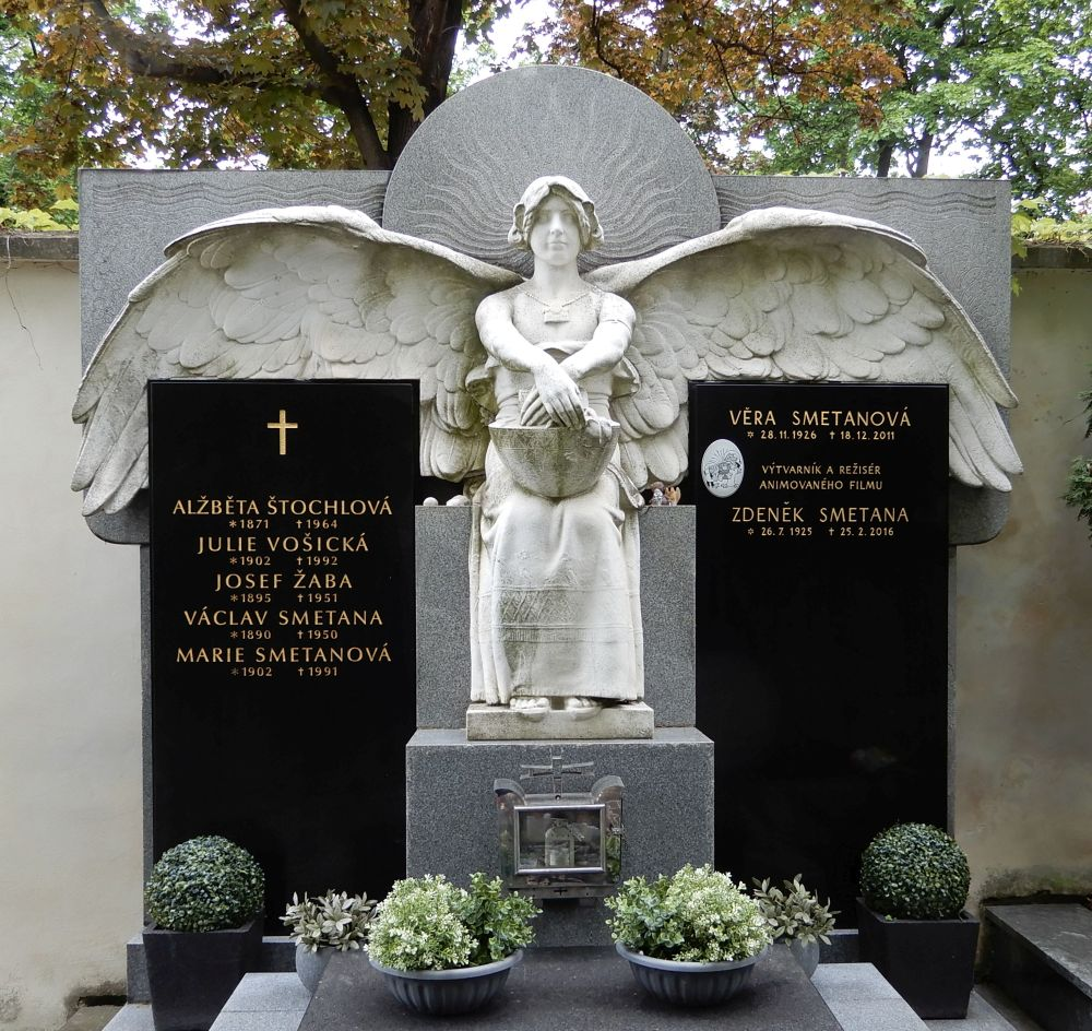 Bubenečský hřbitov, hrob Zdeněk Smetana